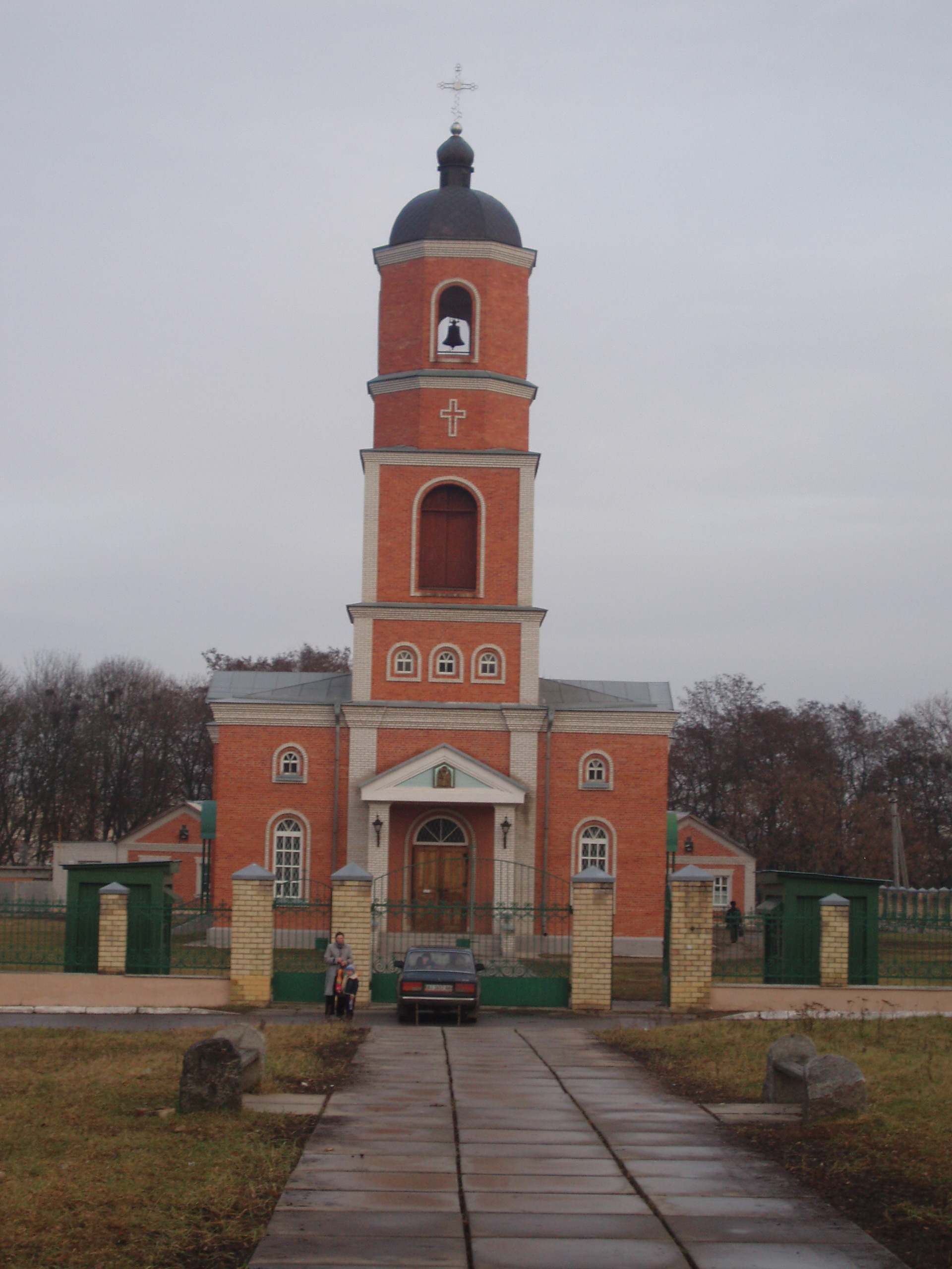 Михайлівська церква у м.Миронівка (Київська обл.)